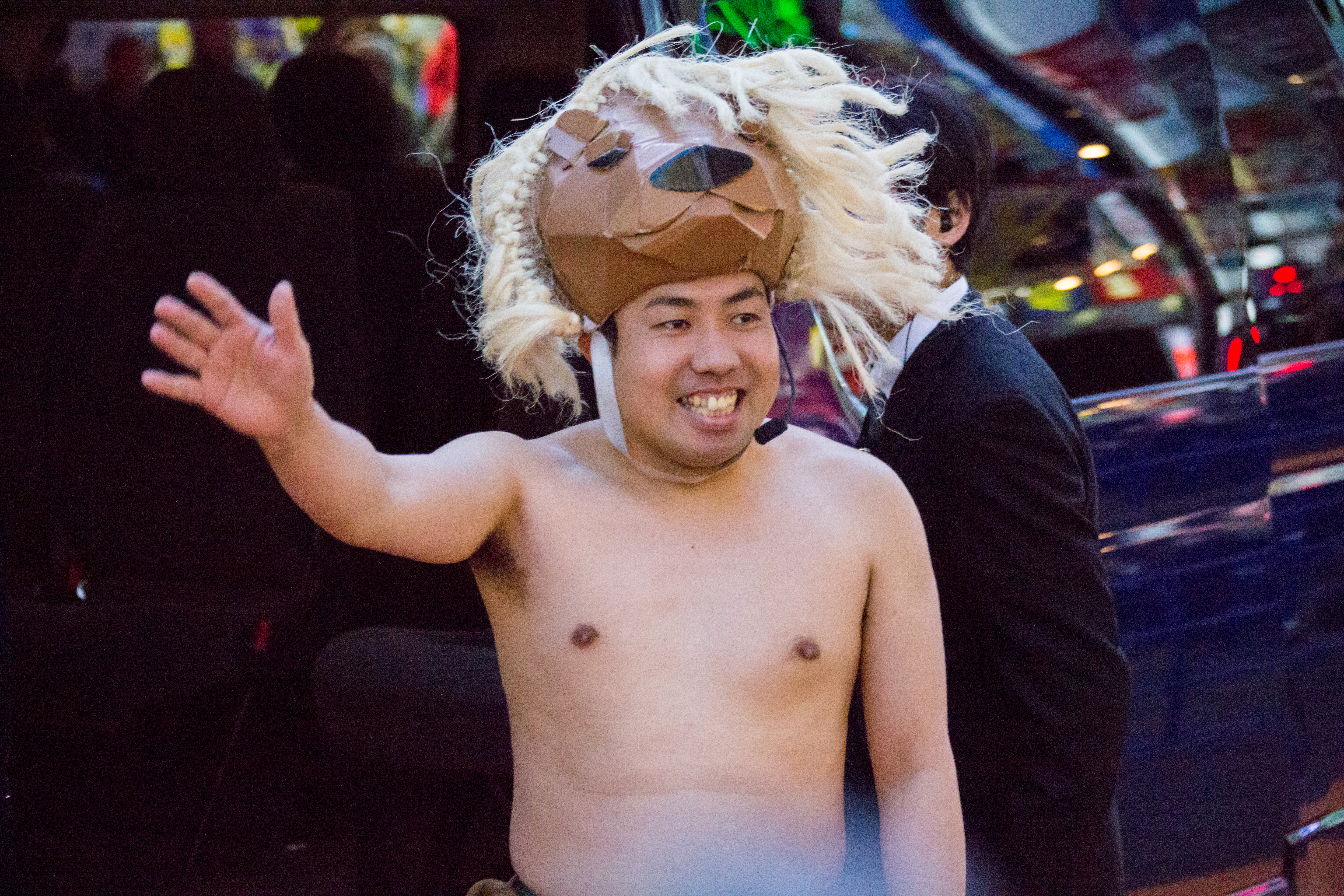 キングコング: 髑髏島の巨神 ジャパンプレミア レッドカーペット 大西ライオン